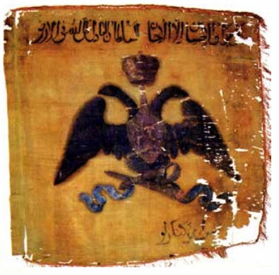 Боевое знамя конницы Кенгерли в Национальном музее истории Азербайджана